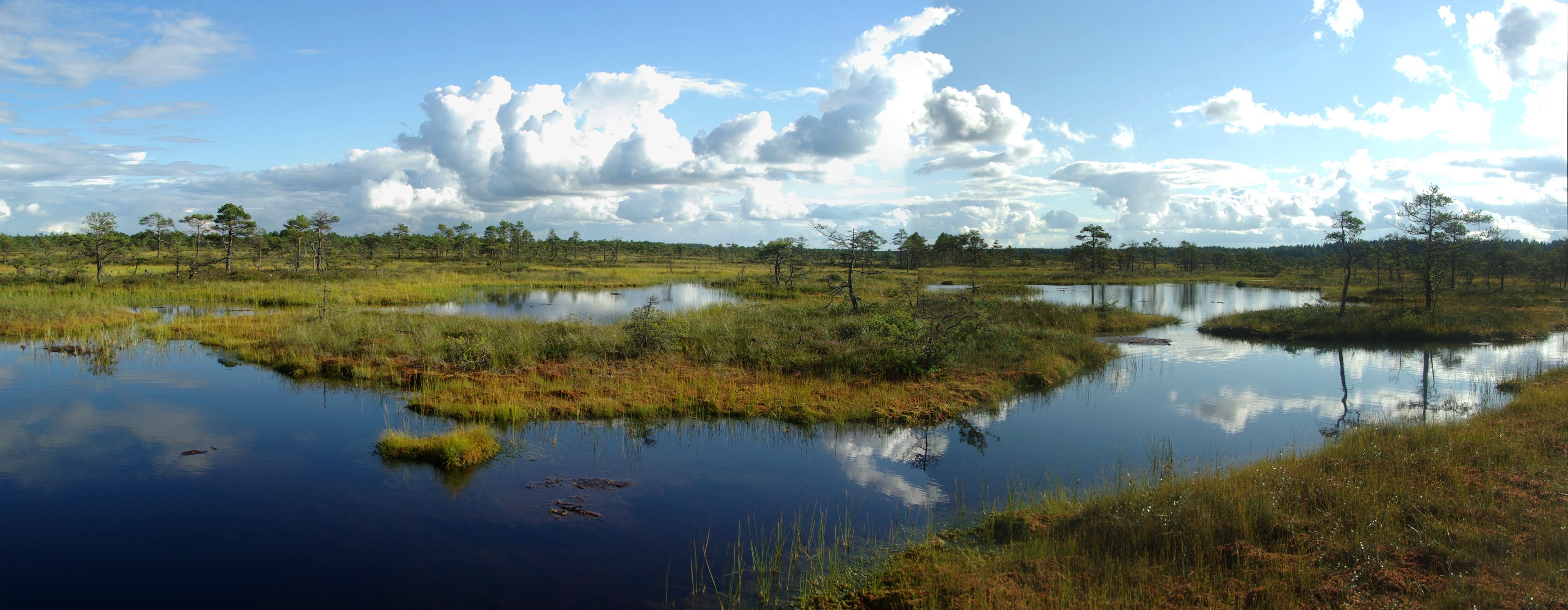 Raba jääb Kõrvemaa maastikukaitsealale